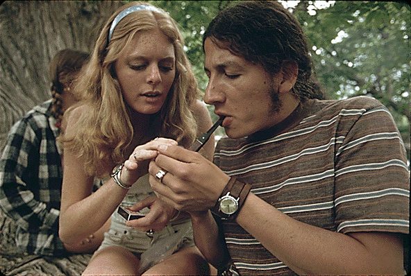 BOY AND GIRL SMOKING POT DURING AN OUTING IN CEDAR WOODS NEAR LEAKEY, TEXAS. (TAKEN WITH PERMISSION) 05/1973